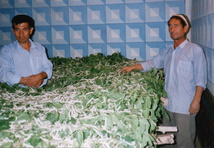 Nutrado de silkvermoj pere de folioj el morusoarbo , en vilaĝo de Ĥorezmo- persona foto sen kopirajto